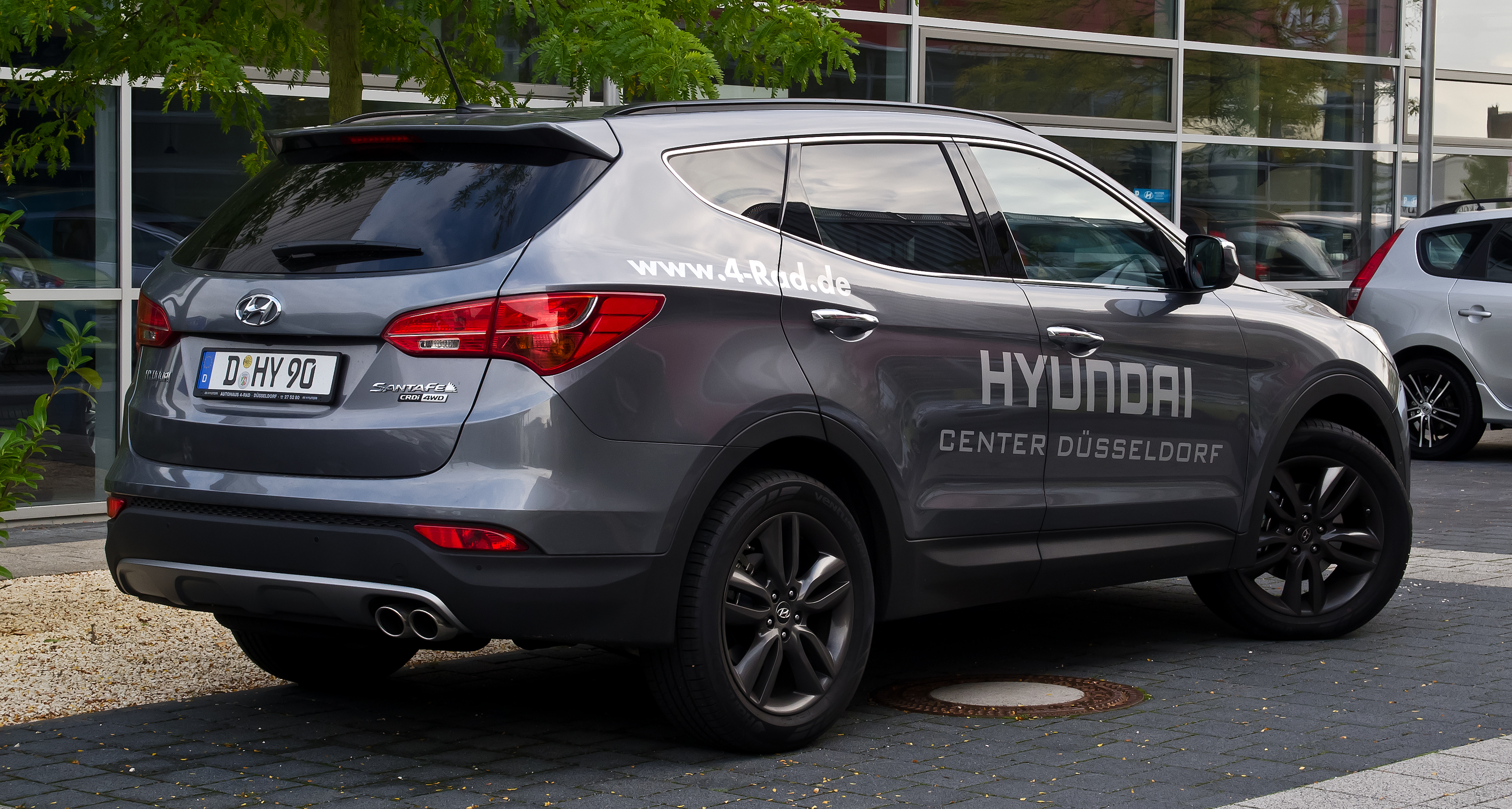 Hyundai Santa Fe 2.2 CRDi 4WD Premium (III)